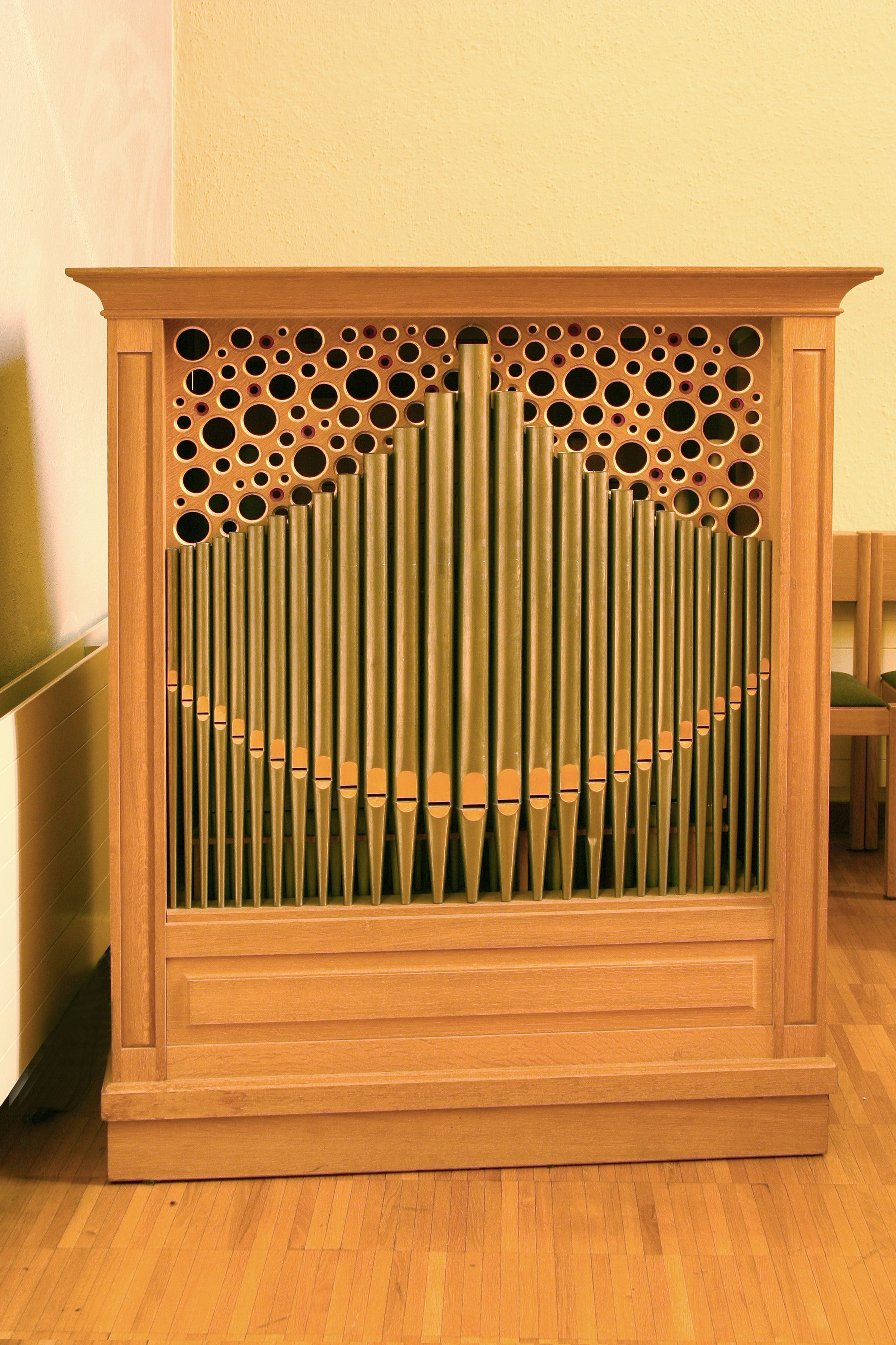 Römisch-katholische Pfarrkirche Herz Jesu Winterthur-Mattenbach